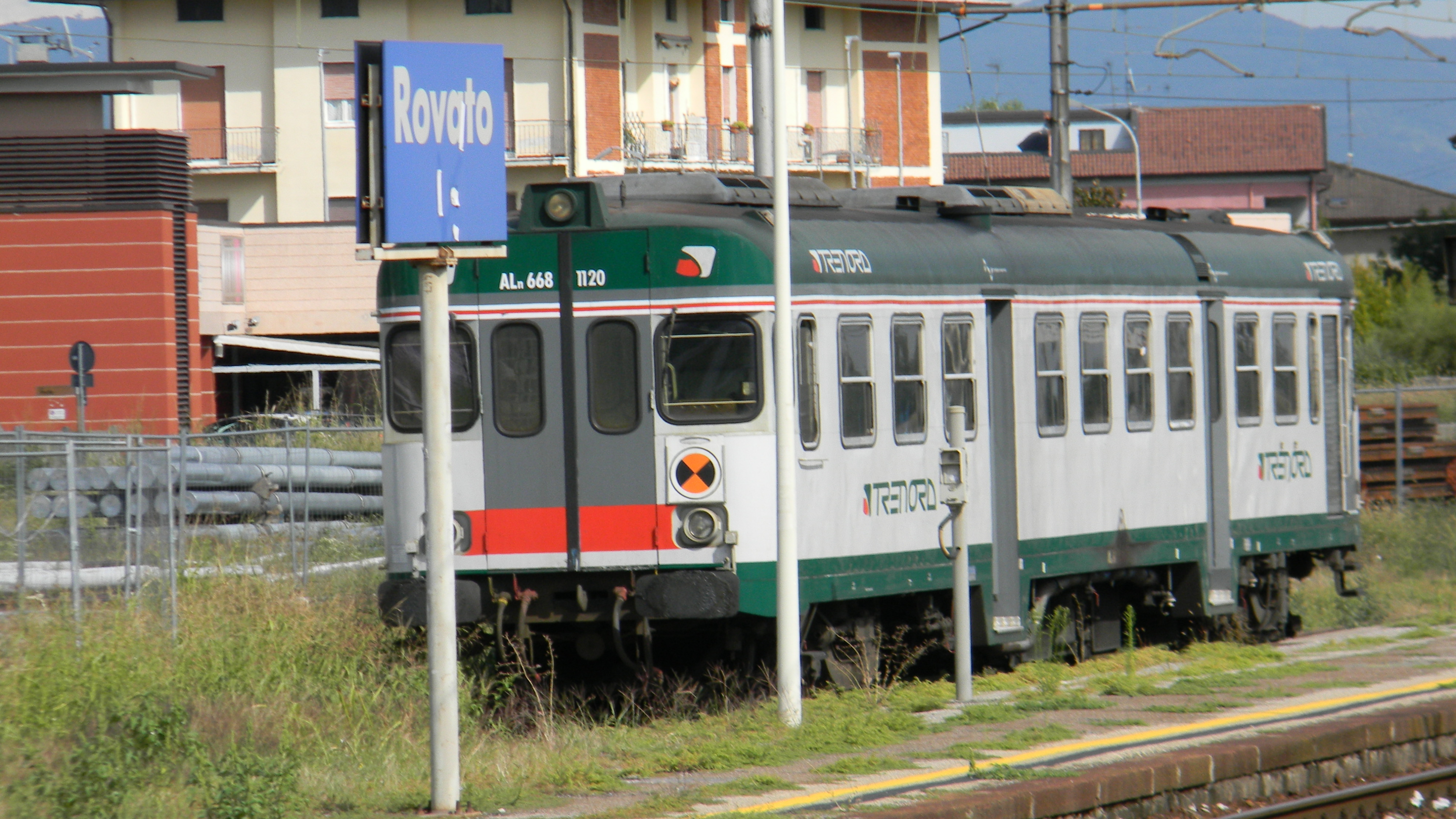 Automotrice ALn 668.1000 in livrea Trenord, in sosta a Rovato (BS).